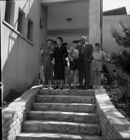 1945-6 - חנוכת בית סרני בתמונה עדה סרני